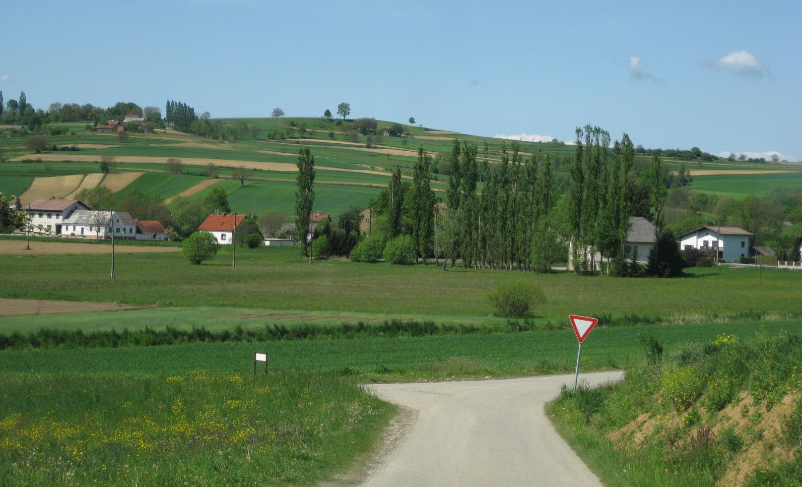 Sotina, village in Slovenia